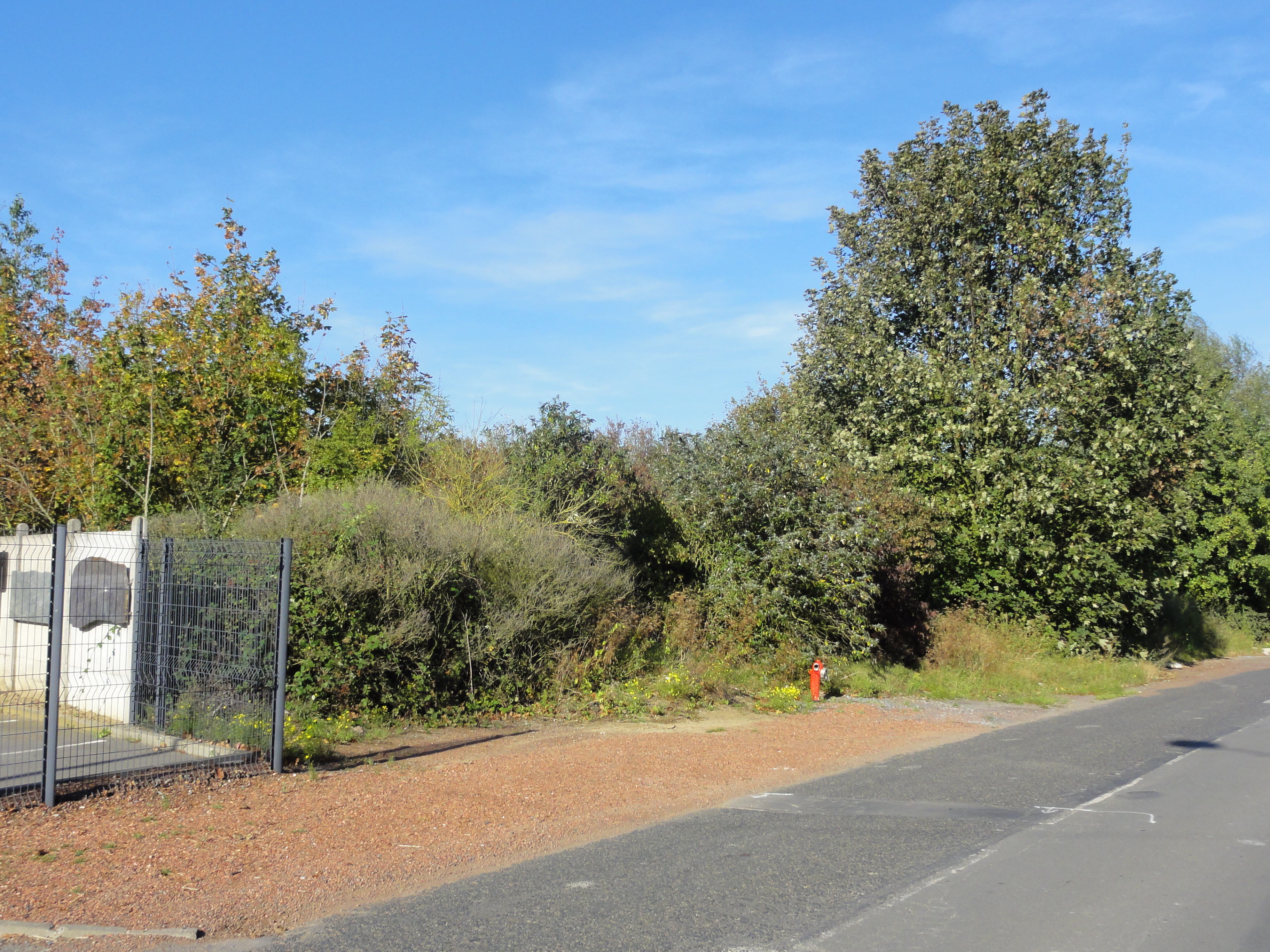 Terril n° 240 dit Cavalier du 23, disparu, fosse n° 23 de la Compagnie des mines de Courrières dans le bassin minier du Nord-Pas-de-Calais, Noyelles-sous-Lens, Pas-de-Calais, Nord-Pas-de-Calais, France.